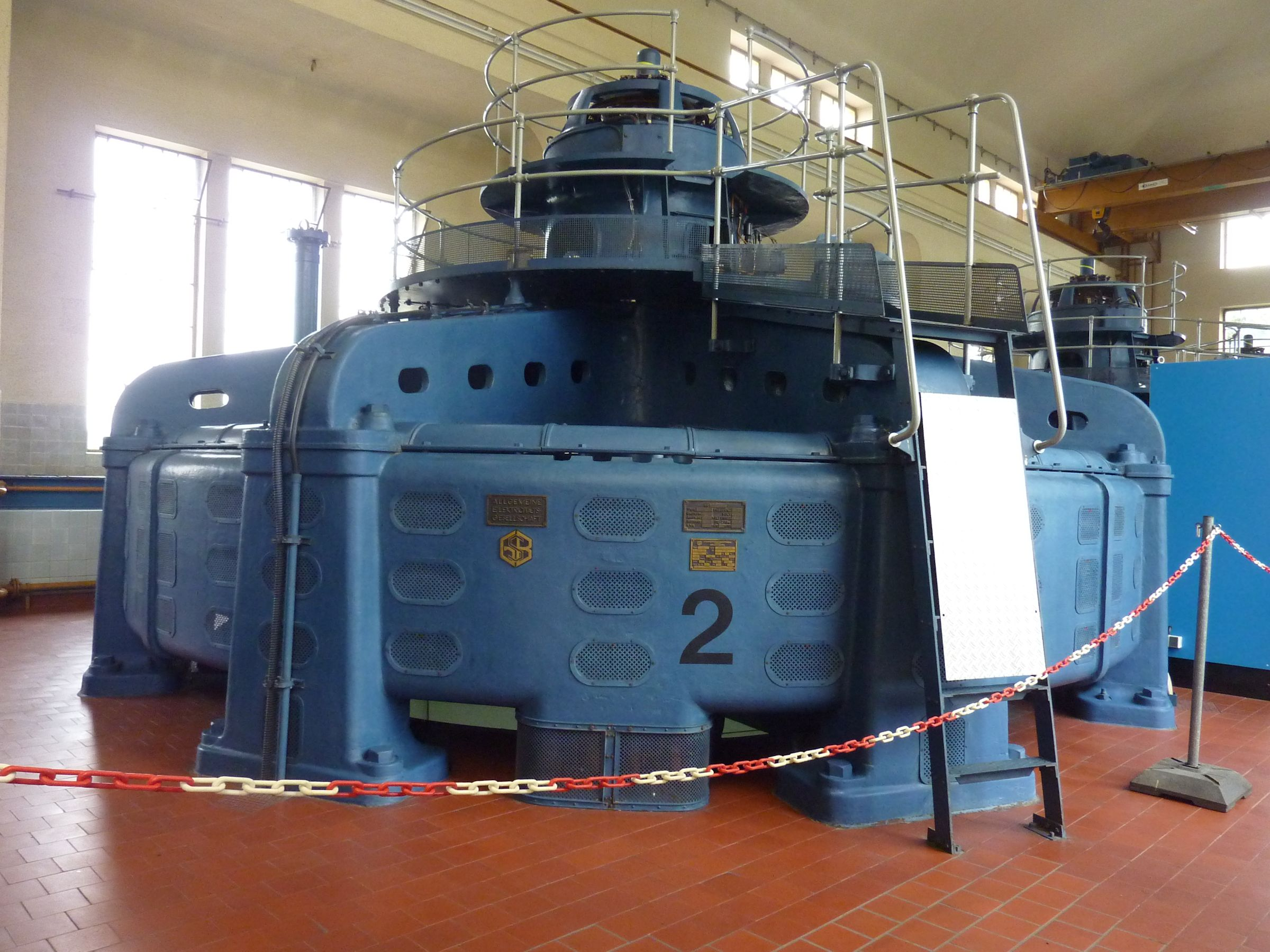 Wasserkraftwerk Pleidelsheim